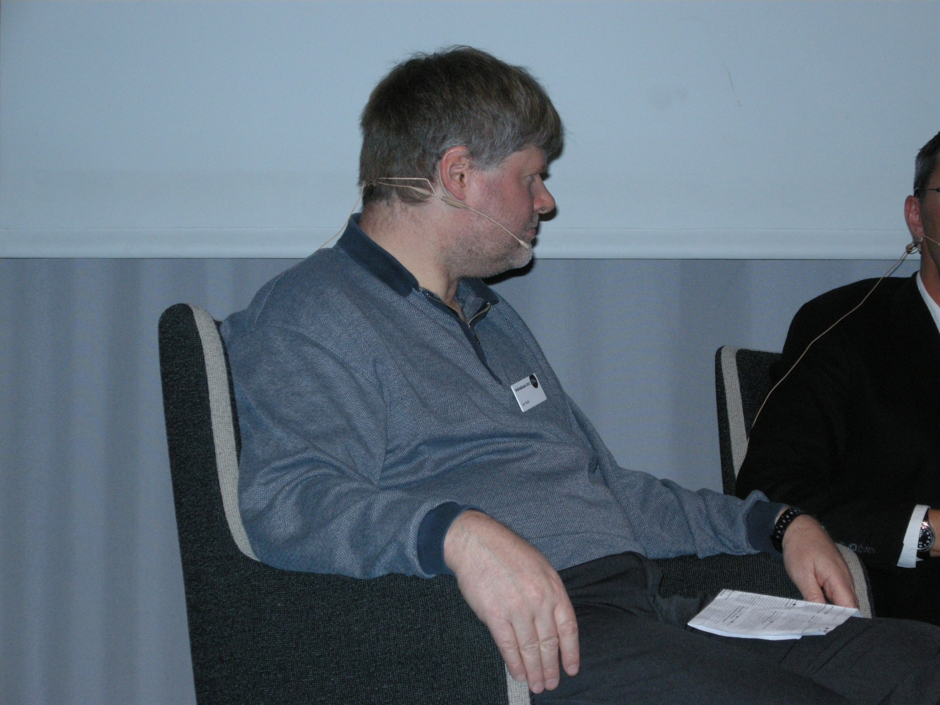 Jan Nolin, professor i biblioteks- och informationsvetenskap vid Bibliotekshögskolan i Borås på Bokmässan i Göteborg 2012